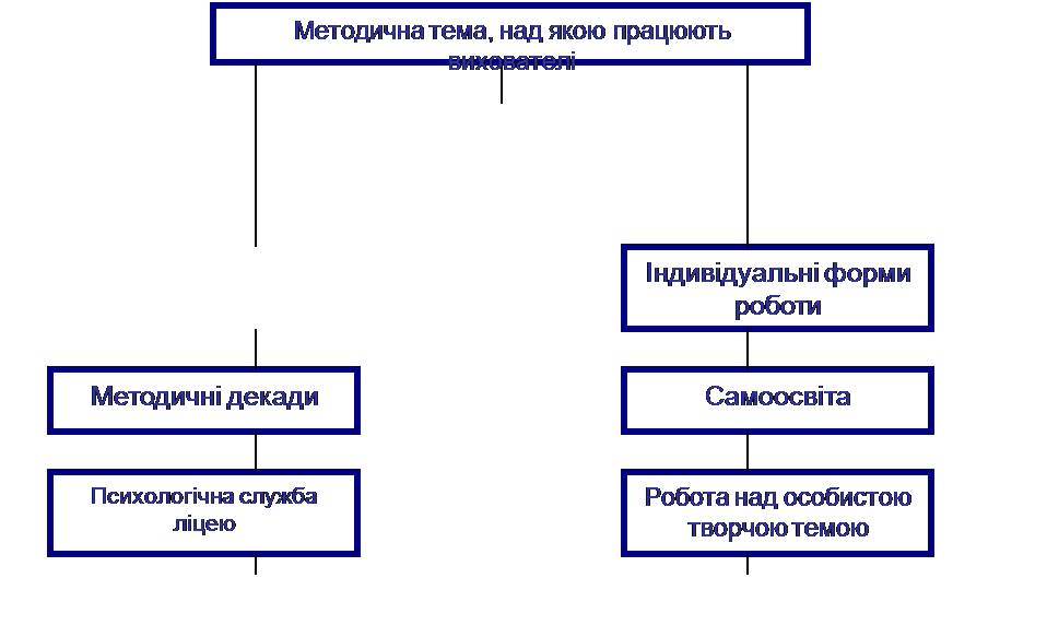 Методична робота вихователів КСЛІ